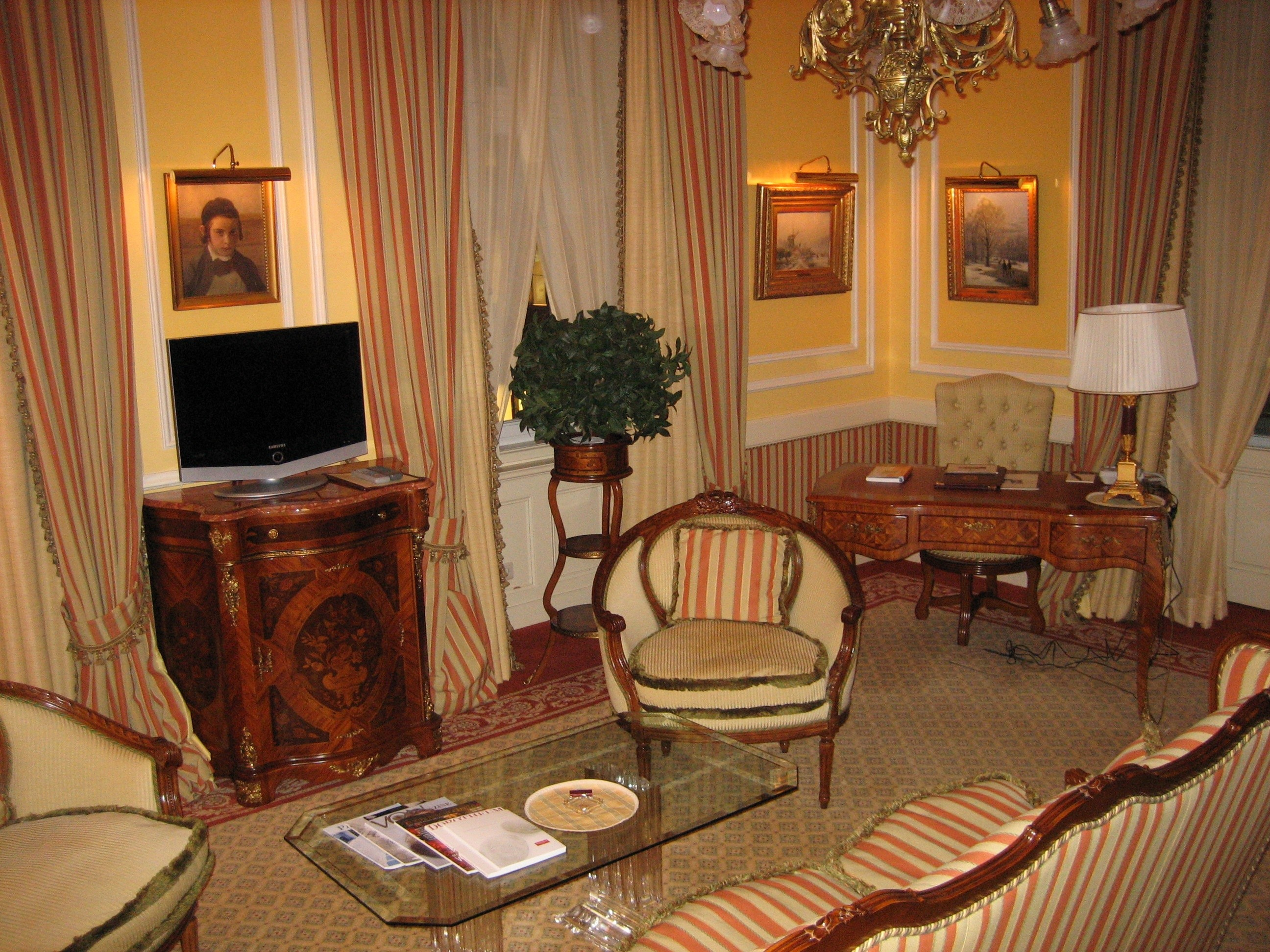 Wien_Hotel_Sacher_Zimmer